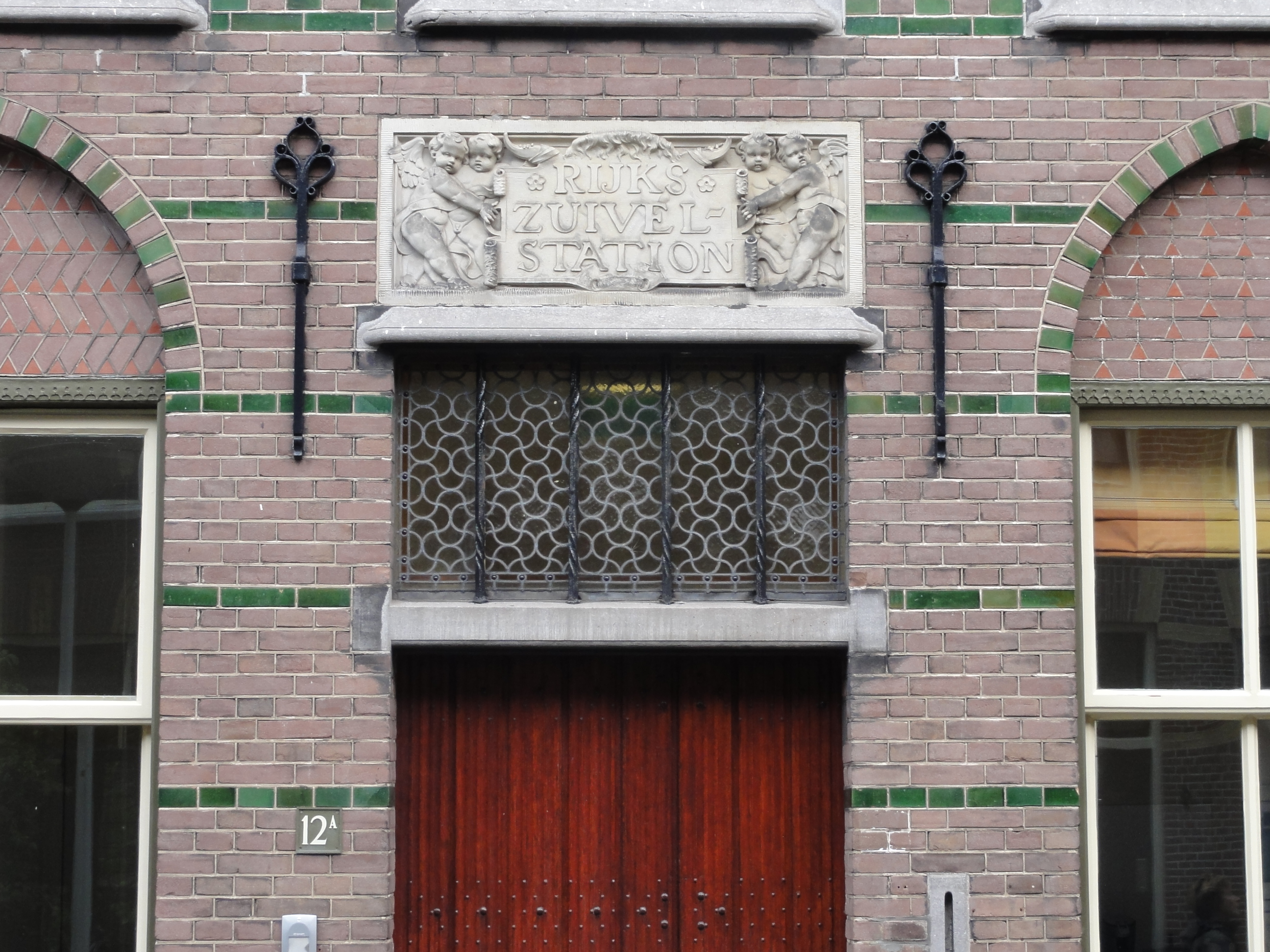 Voormalig Rijkszuivelstation, Vreewijkstraat 12a, Leiden